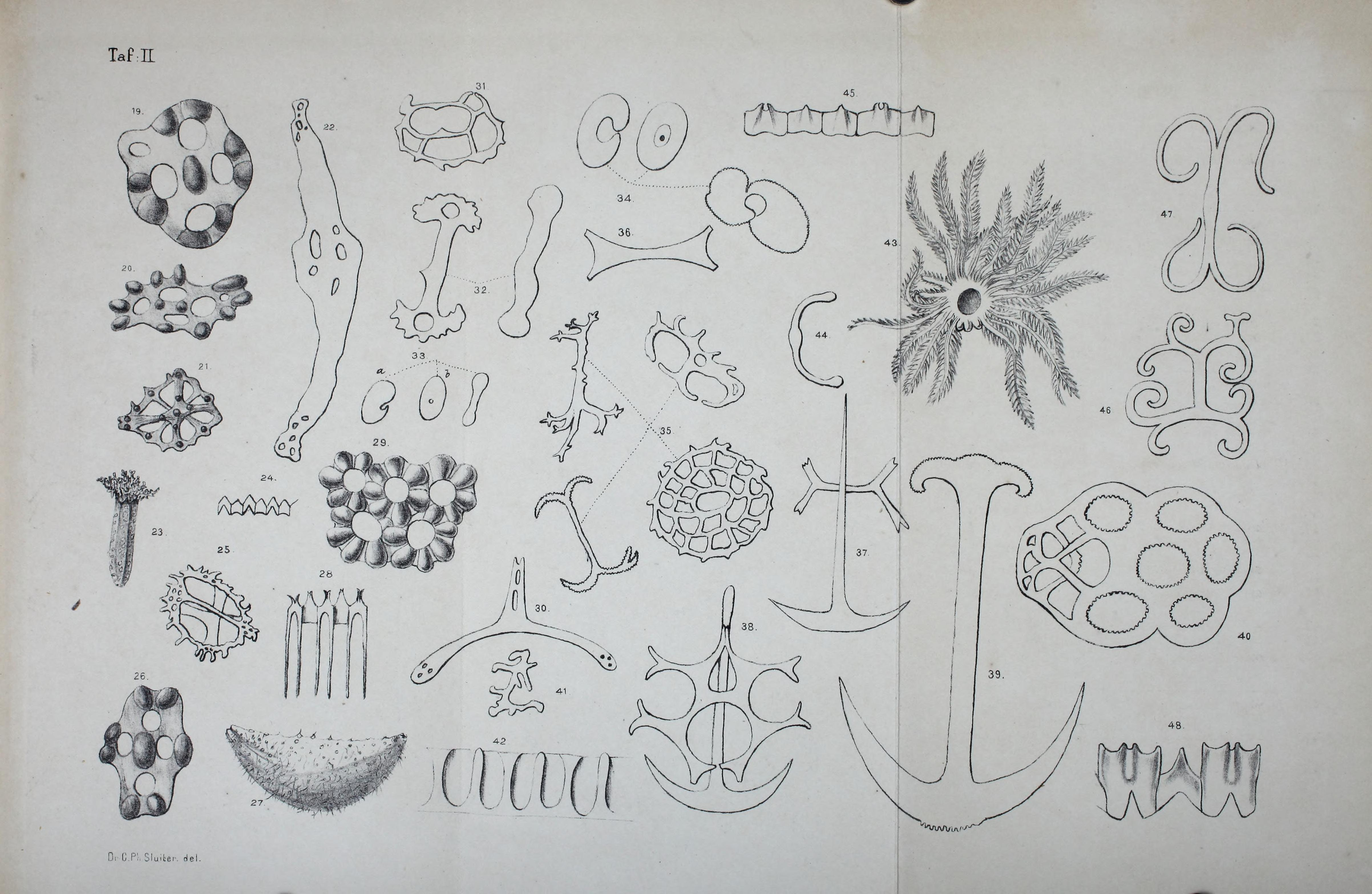 Natuurkundig tijdschrift voor Nederlandsch Indië / uitgegeven door de Natuurkundige Vereeniging in Nederlandsch Indië.